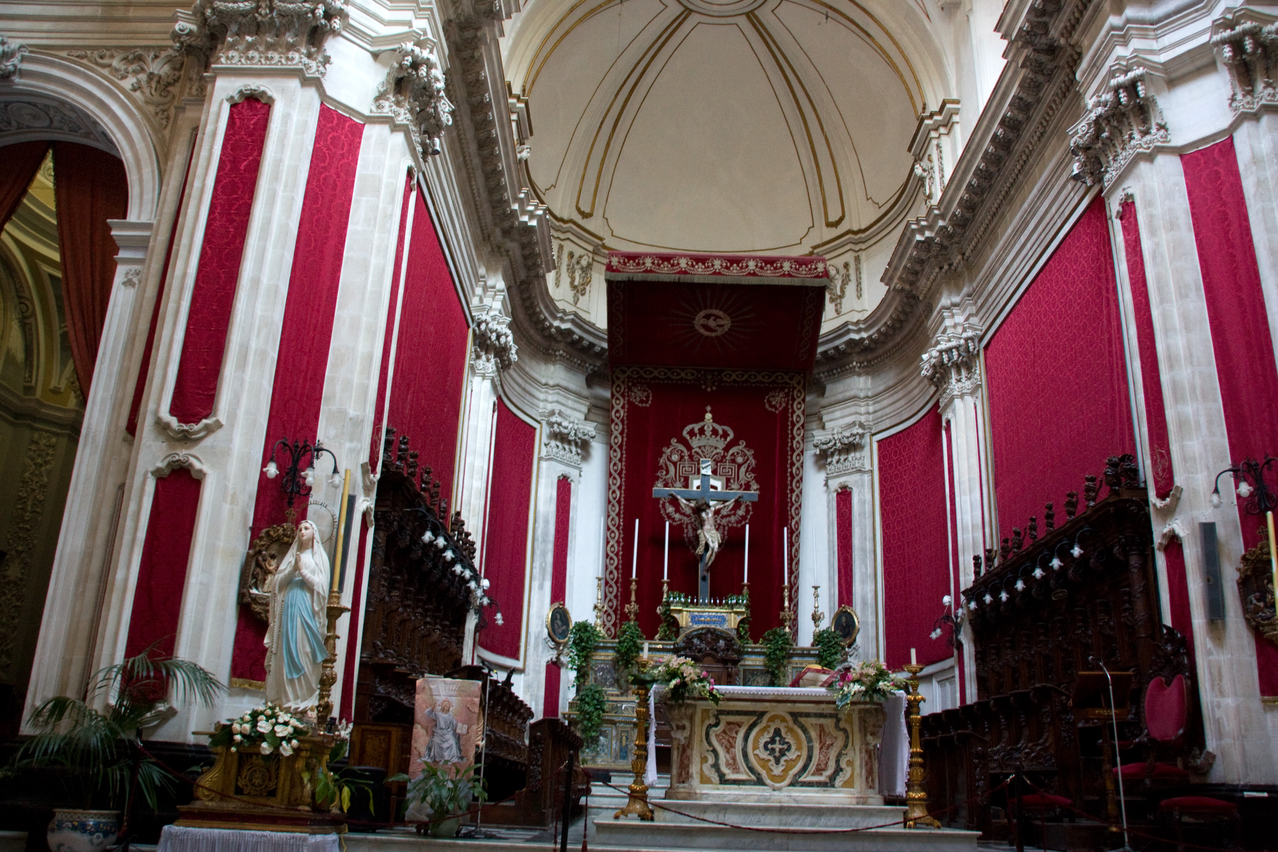 Duomo di S. Giorgio, Ragusa Ibla, Sicile, Italie